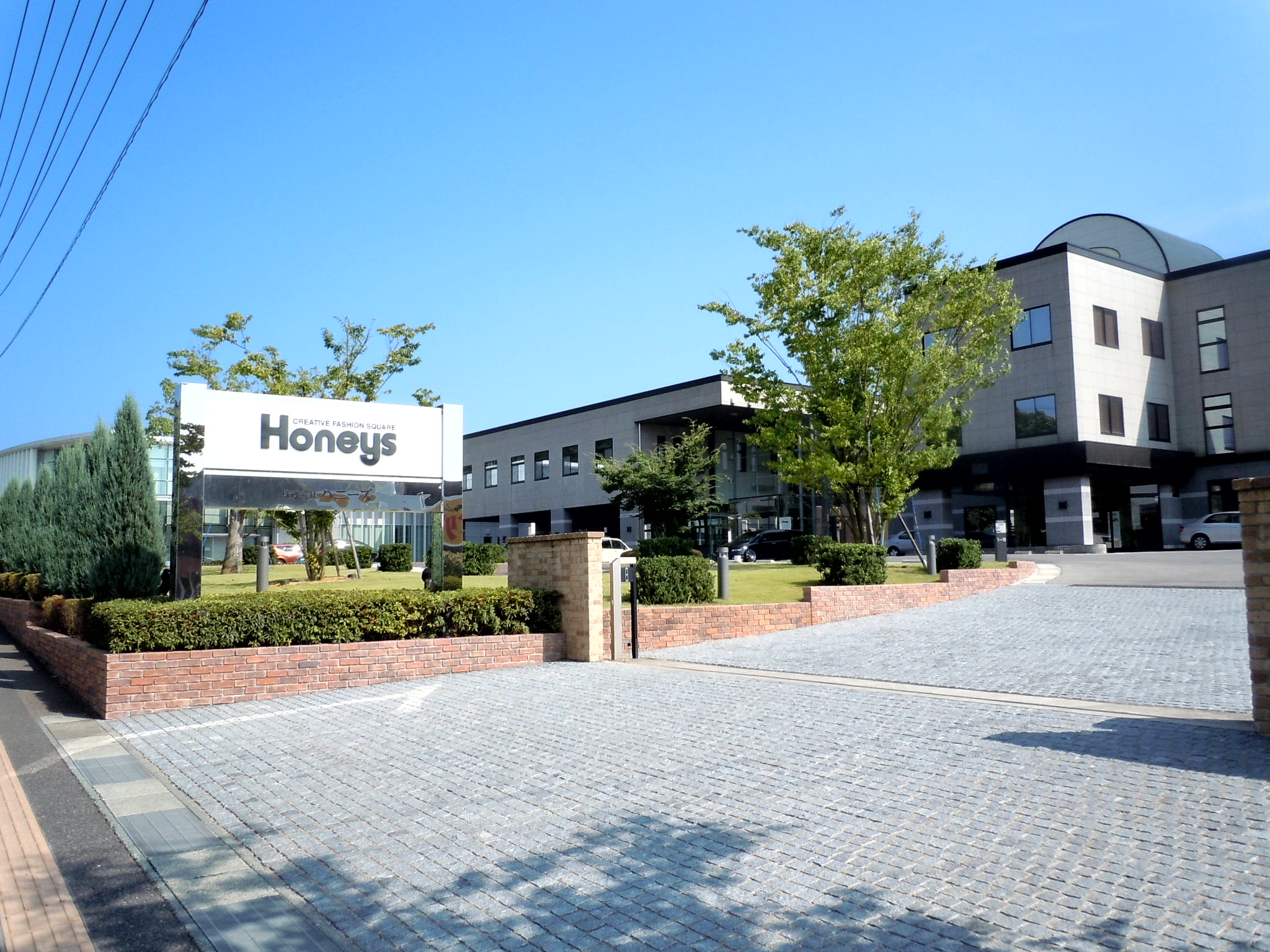 ハニーズ本社